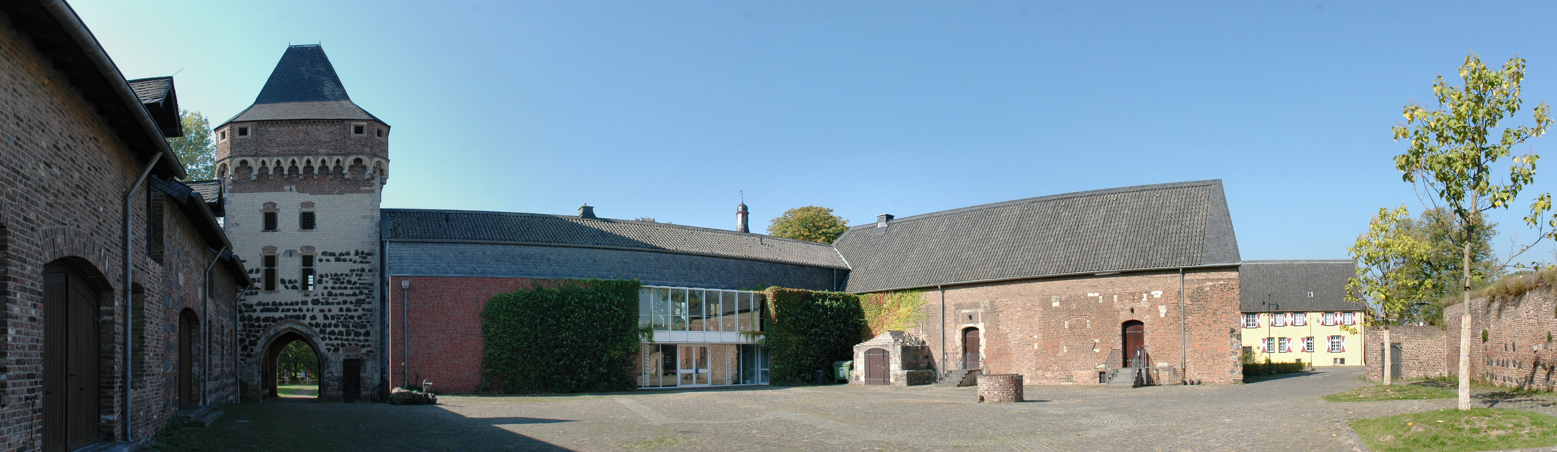 Innenhof der Burg Friedestrom in Dormagen-Zons This image was created with Hugin.